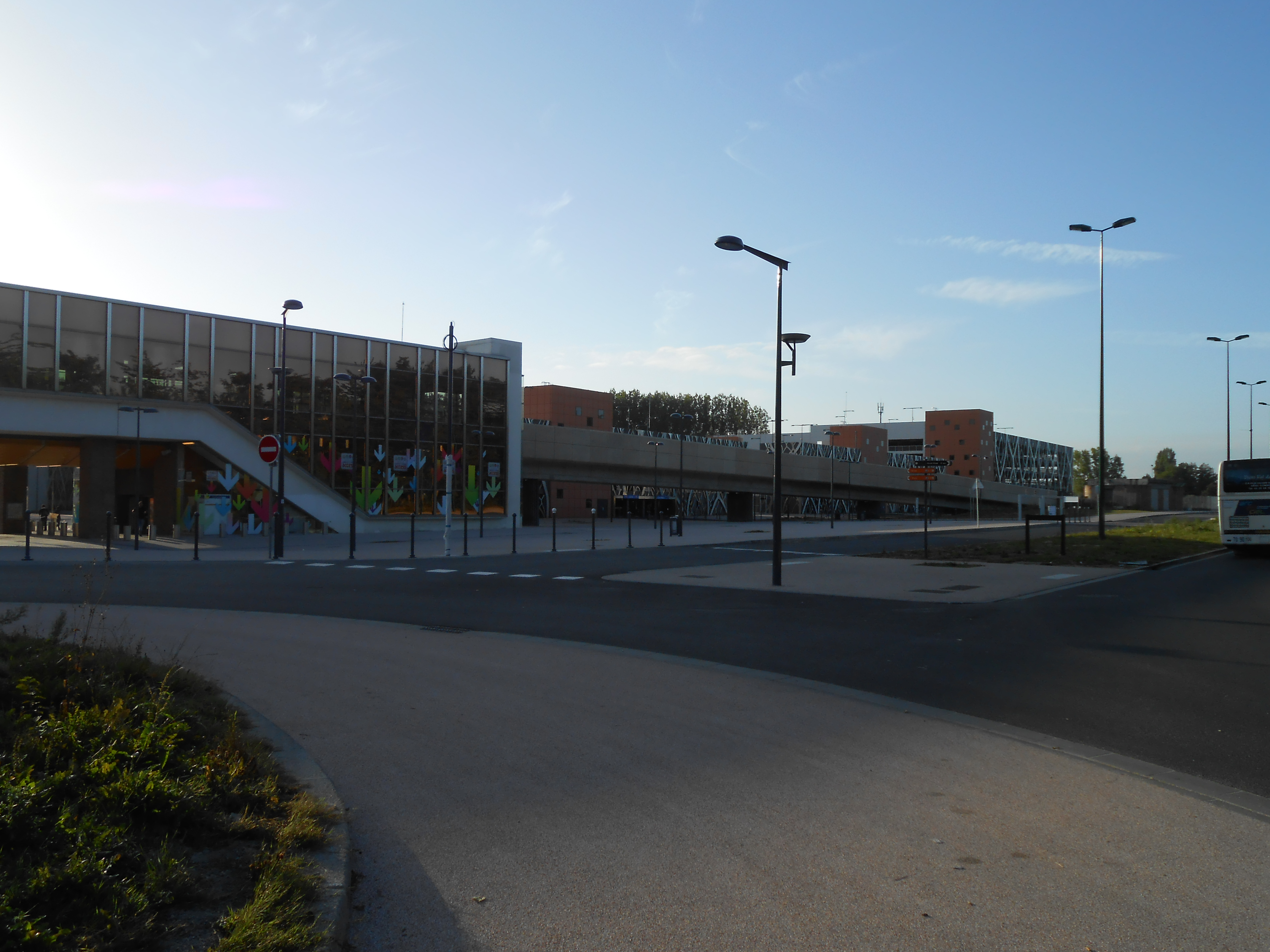 Station Quatre Cantons - Grand Stade de la ligne 1 du métro de Lille Métropole.